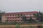 ด้านหลังโรงเรียน